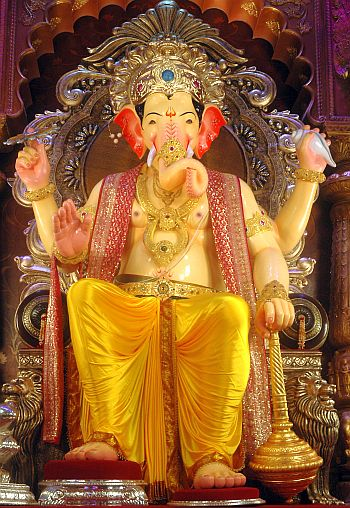 Ganapati Bappa Moraya